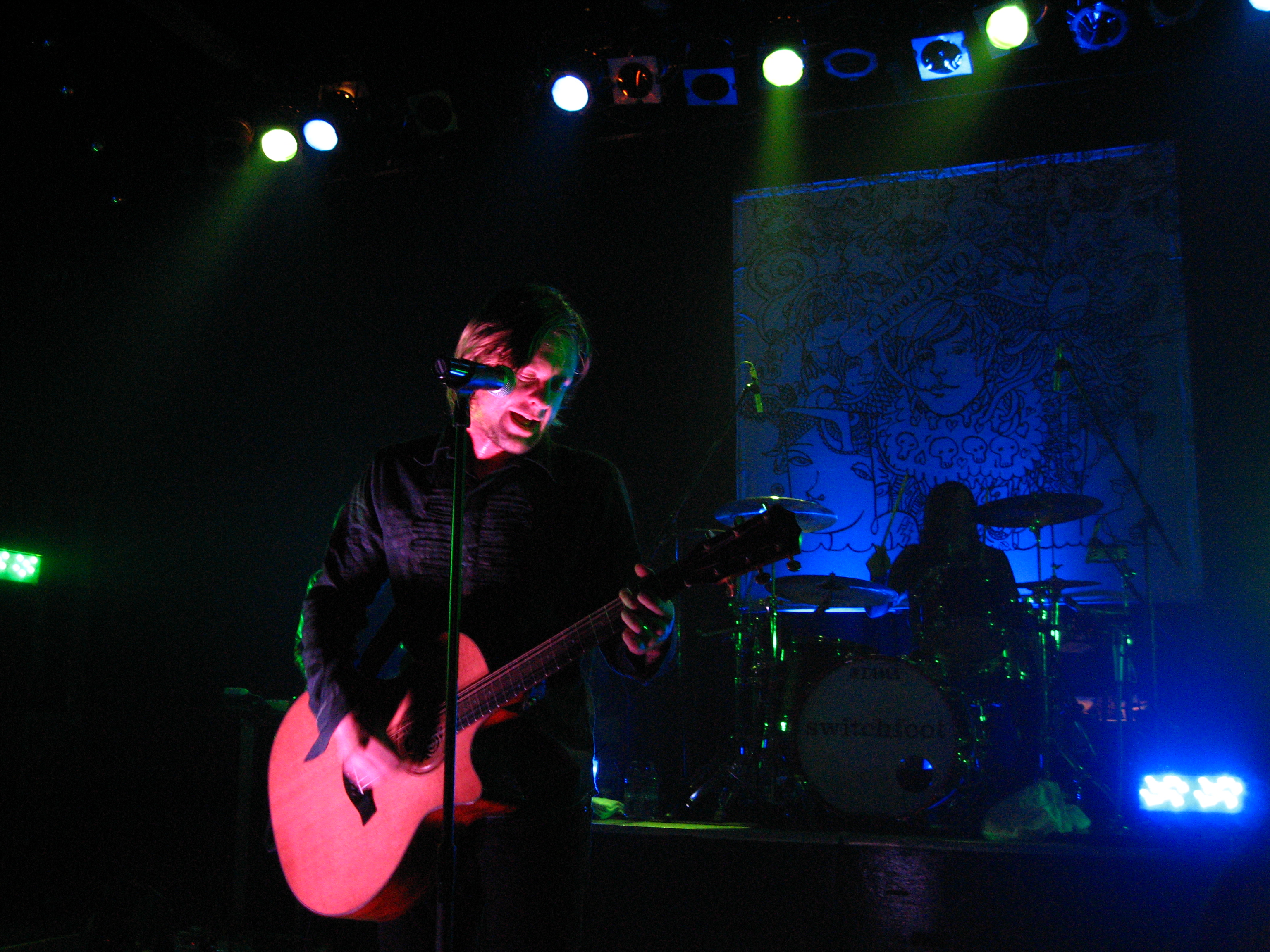 Taken by me